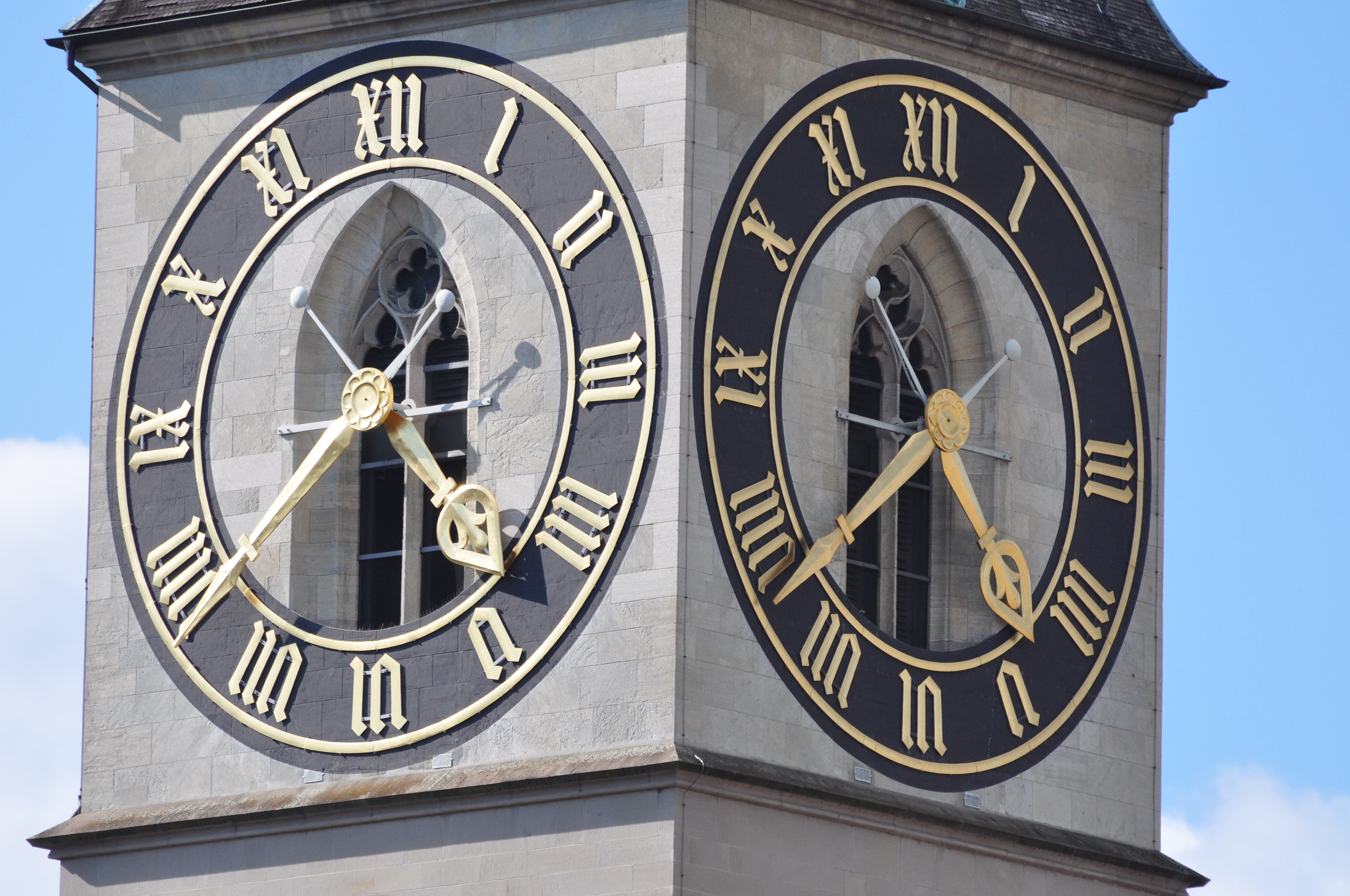 St. Peter as seen from Wasserkirche in Zürich (Switzerland)